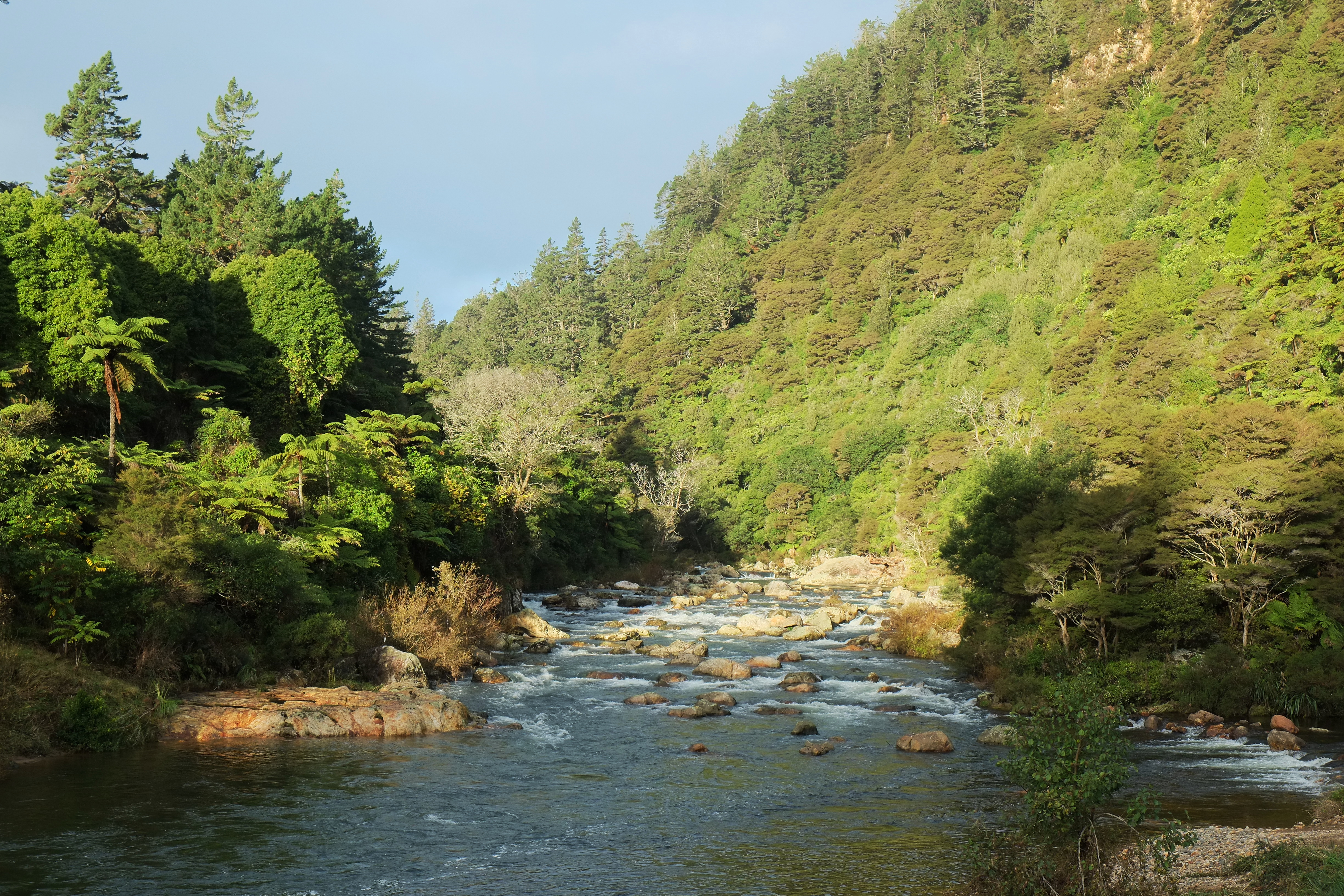 Ohinemuri River at Karangahake